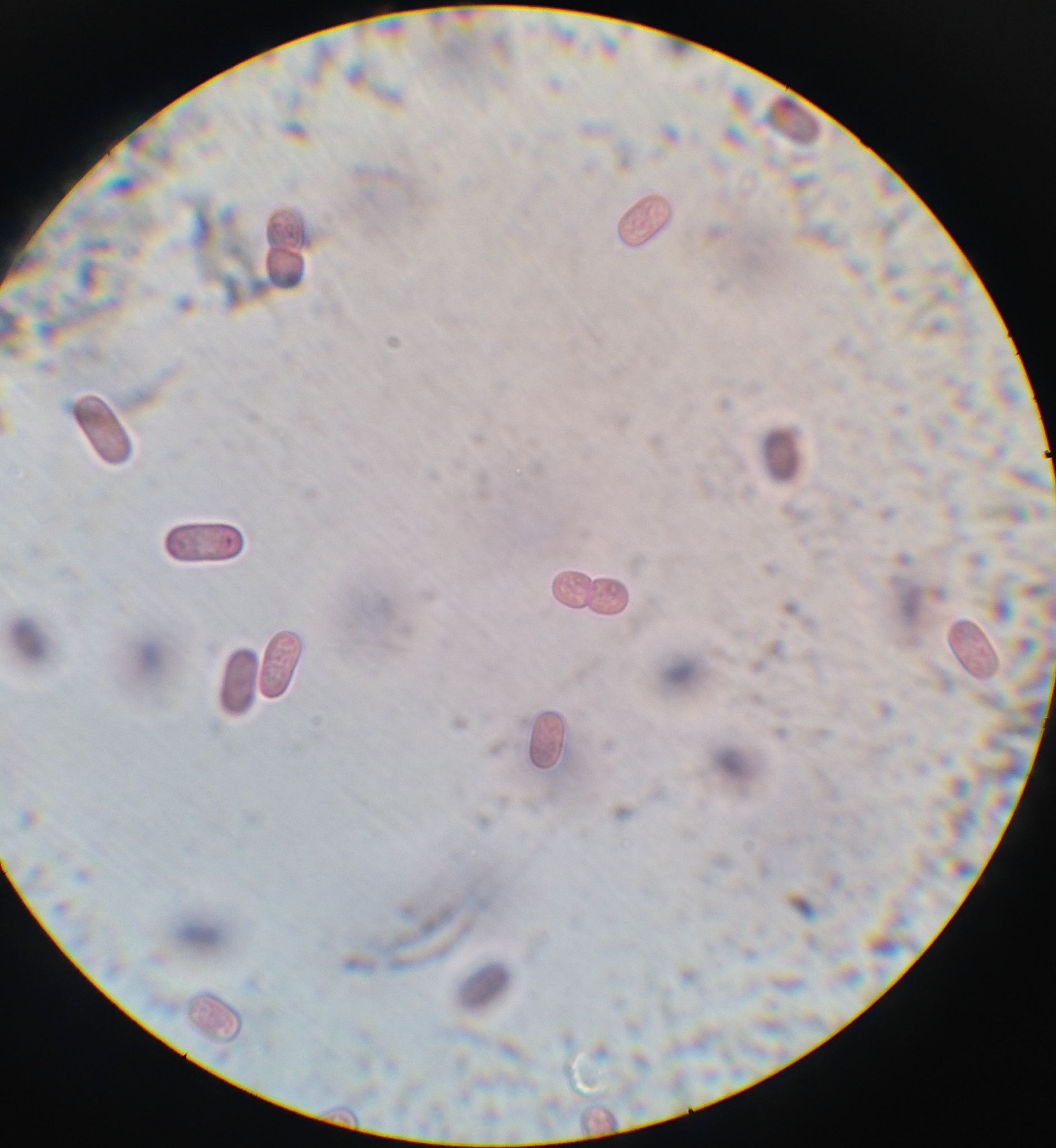 Chromatium Okenii al microscopio ( ingrandimento 600x)